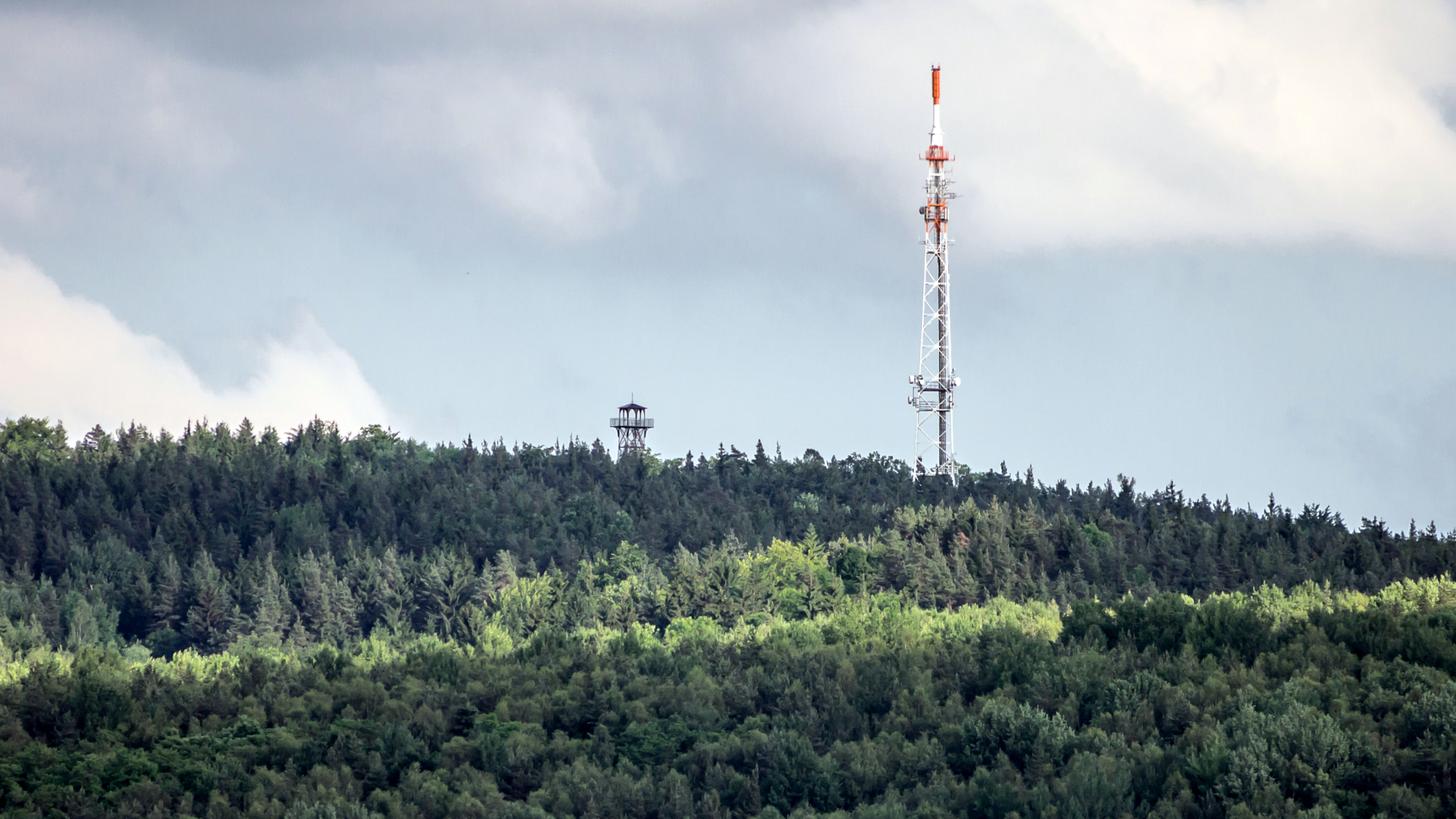 Landschaftsschutzgebiet 49 „Kulm“, Aussichtsturm und Sendemast (Sender Saalfeld) am Kulm nördlich von Saalfeld/Thüringen